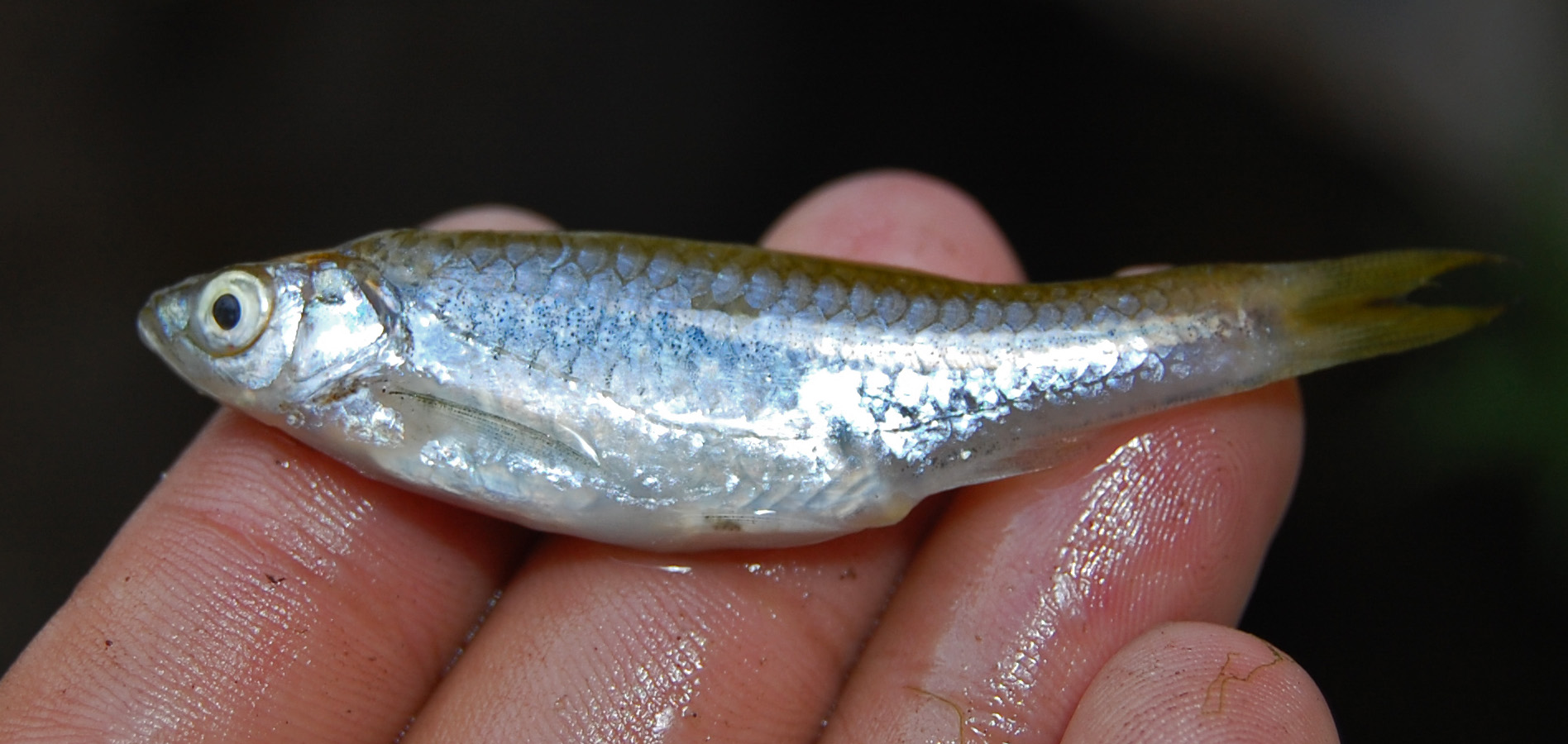 Rasbora argyrotaenia (60mm SL). From Rawagembol, Prembun, Tambak (7°38.3’S 109°23.9’E), Banyumas, Central Java, Indonesia